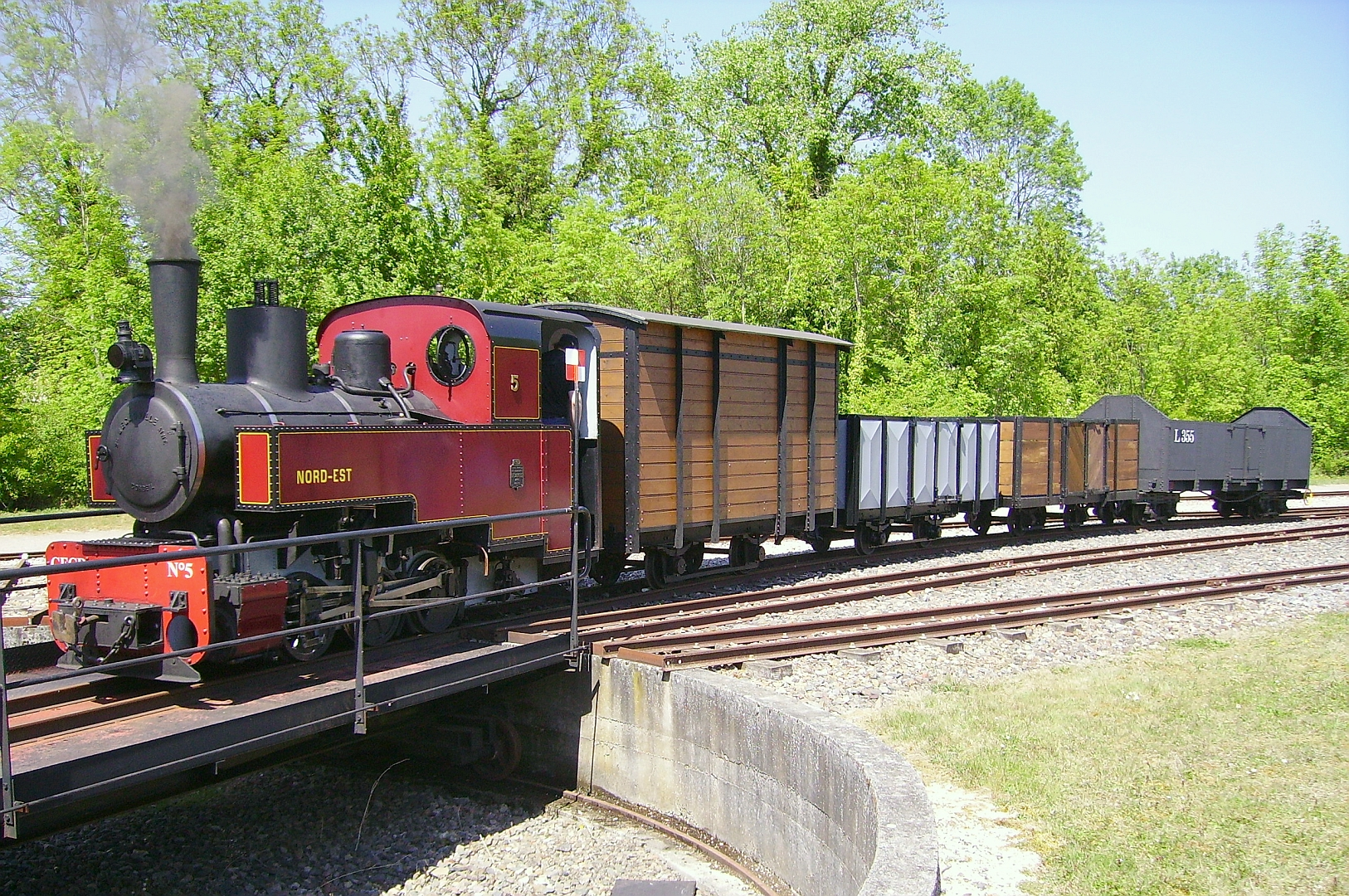 Une rame marchandises tractée par la 030 T N°5 (Decauville N°1652 de 1916) en gare de Froissy (80) sur le Chemin de fer Froissy-Cappy-Dompierre le 23 Mai 2010.